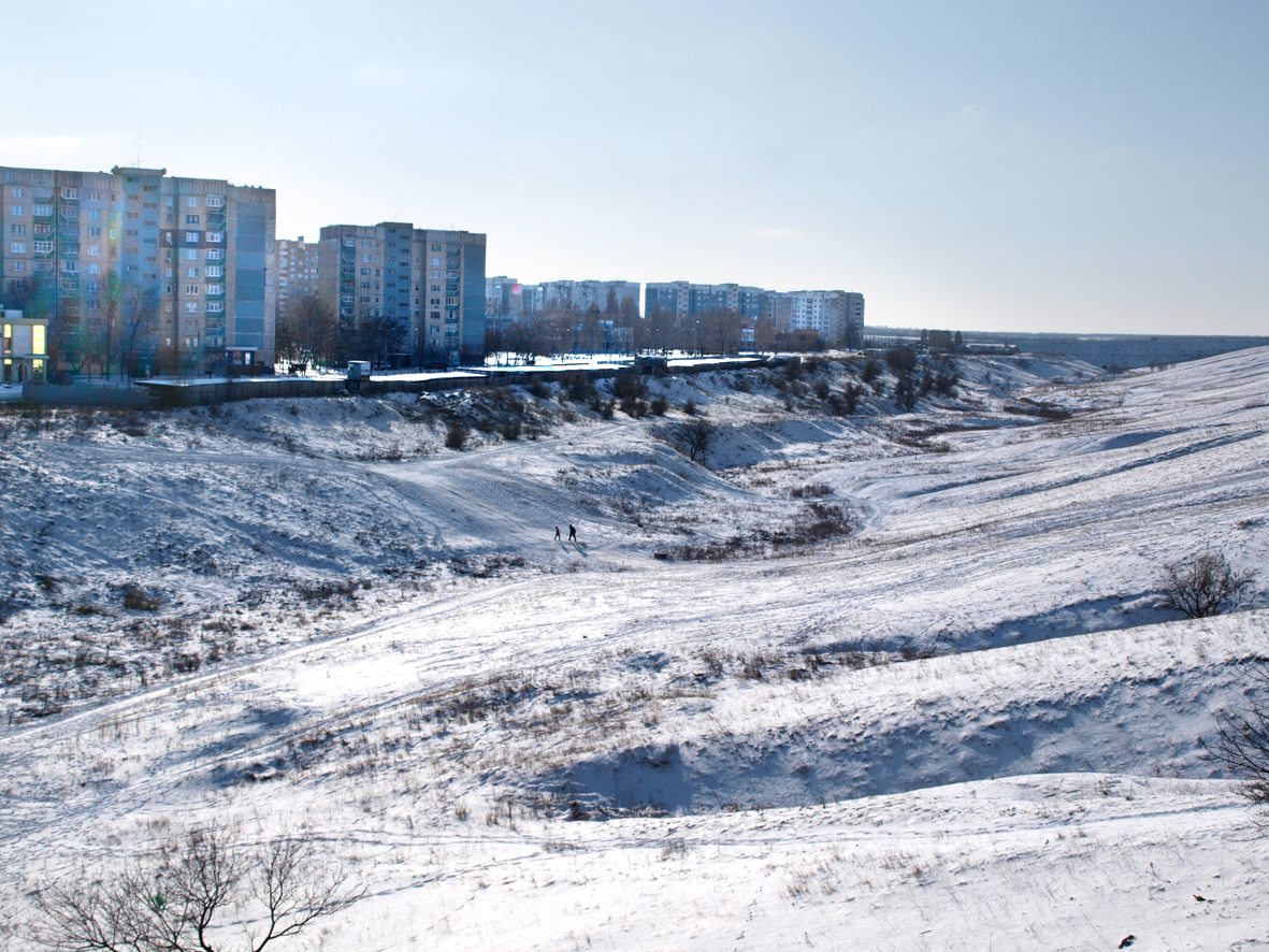 Калмицький яр. Кв. Зарічний над яром, Луганськ